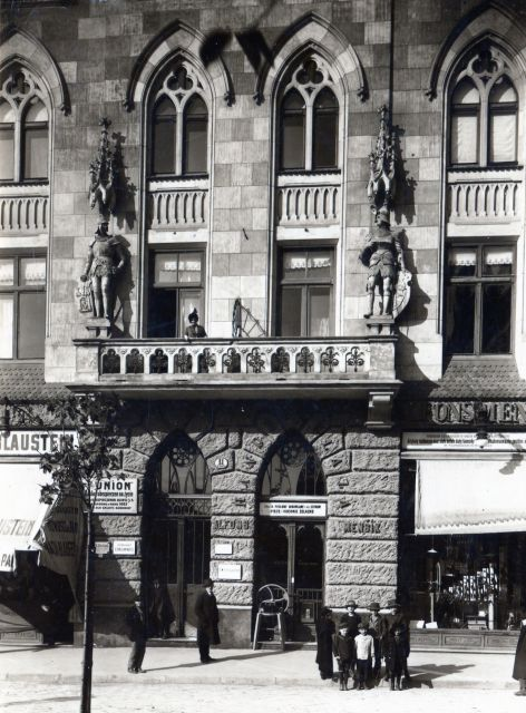 Фото будинку на Валовій 11. Автор невідомий.